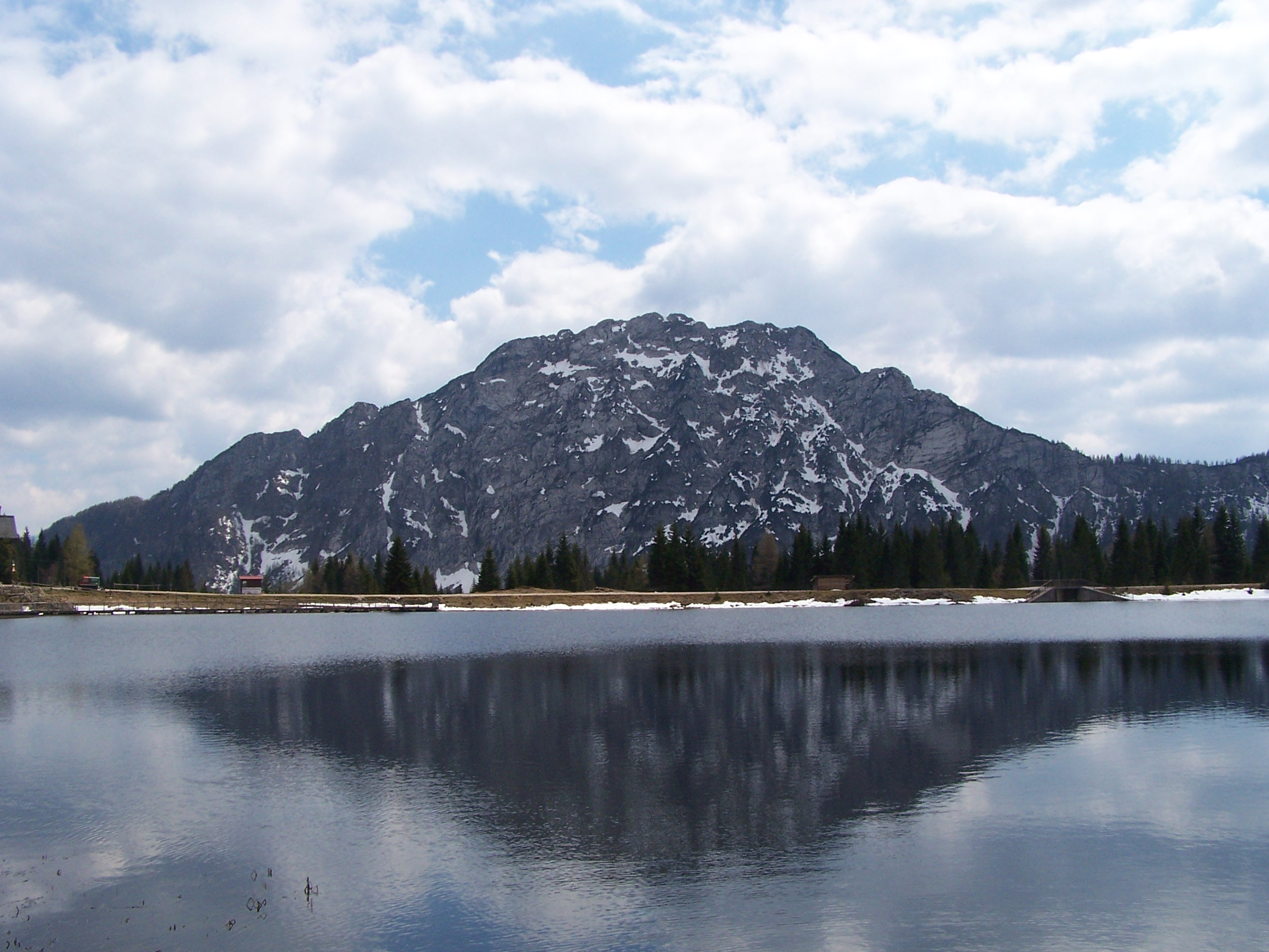 Naßfeld (1530m) und Monte Malvueric alto (Malurch, 1899m), Karnische Alpen